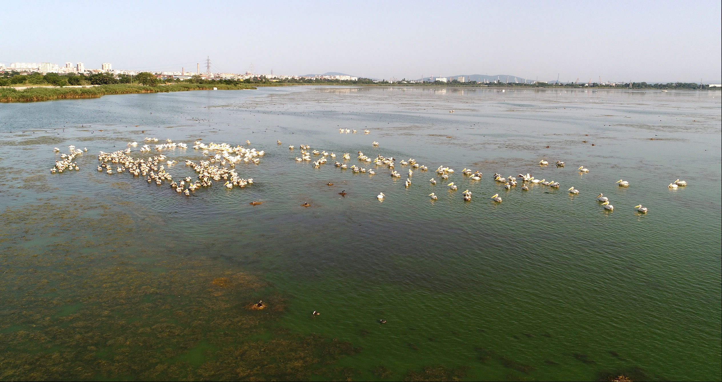 Пеликани в езерото Вая